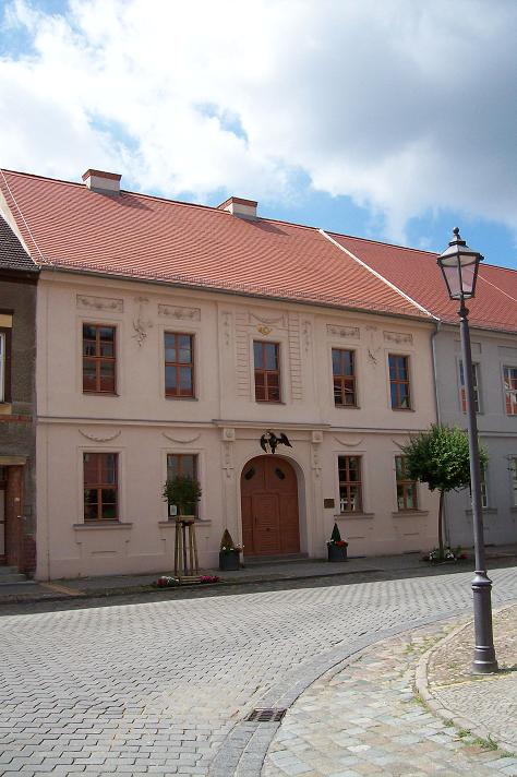 Alte Posthalterei Beelitz